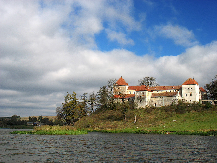 Свіржський замок